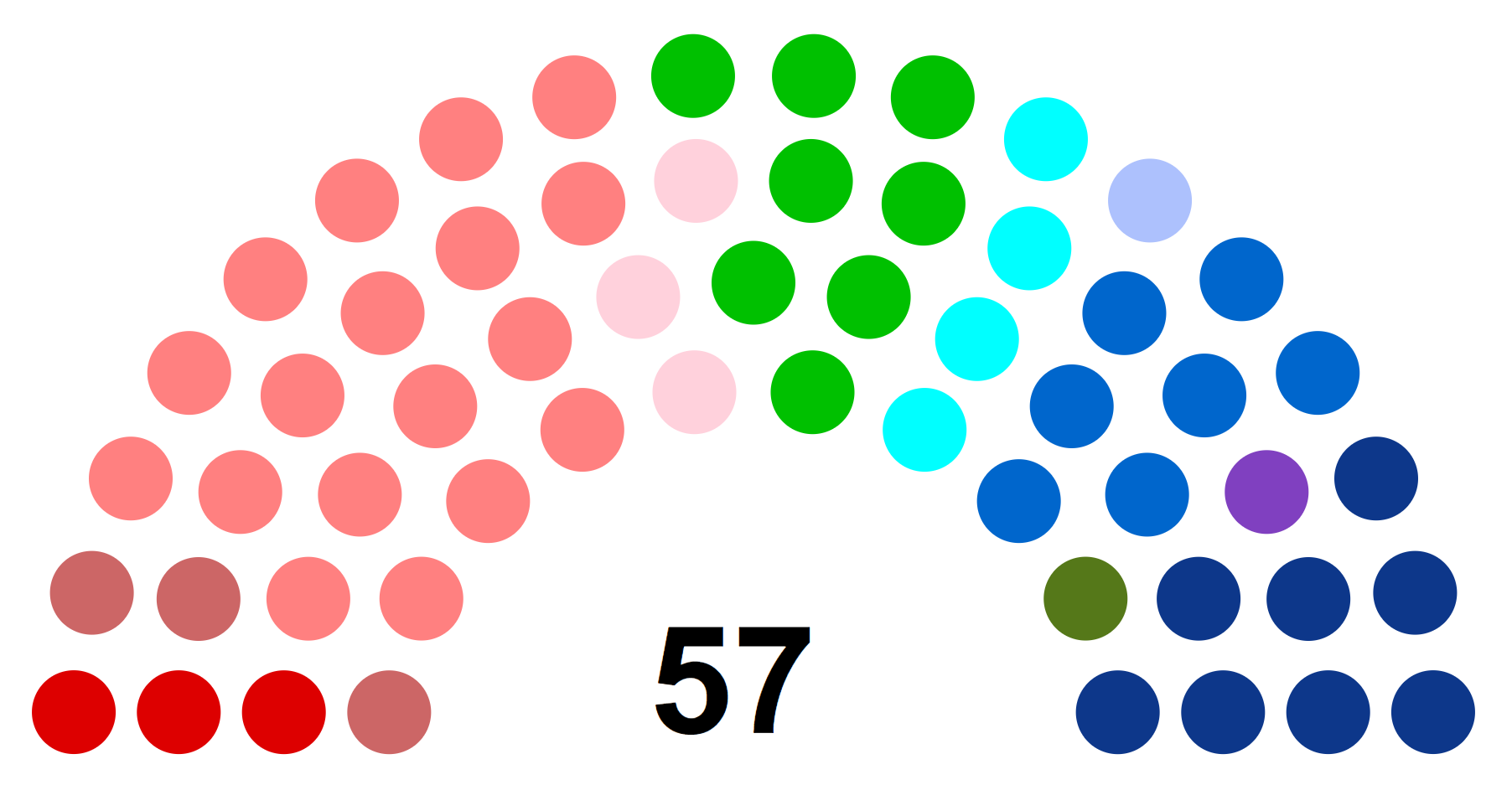 Partis politiques représentés au Conseil régional de Picardie en 2010